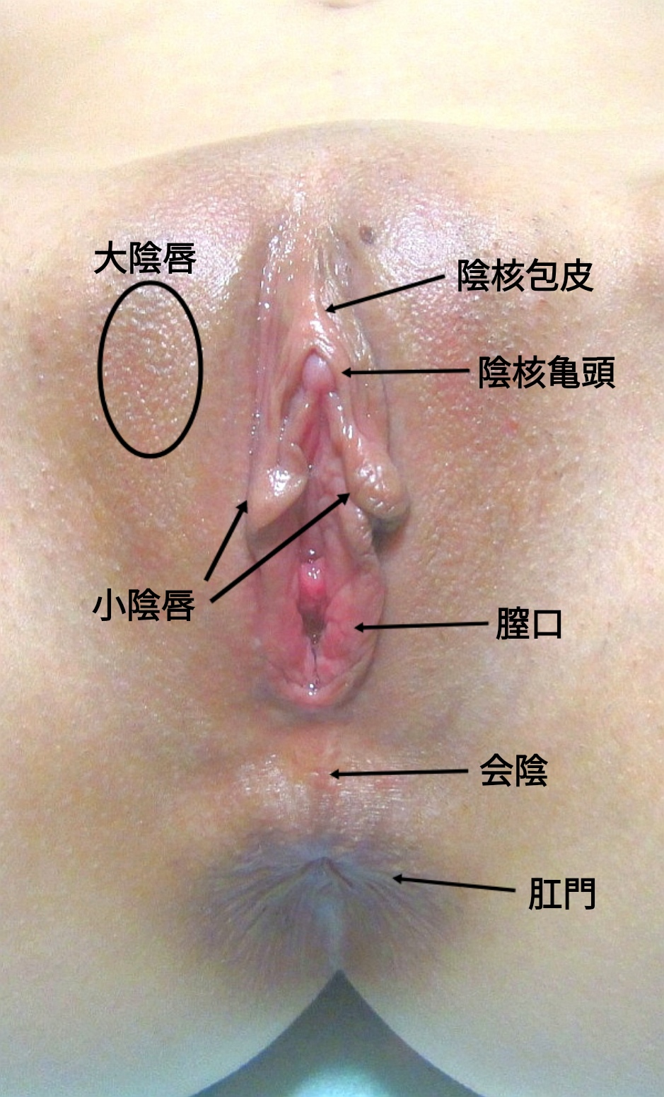 ヒトの女性器の外観